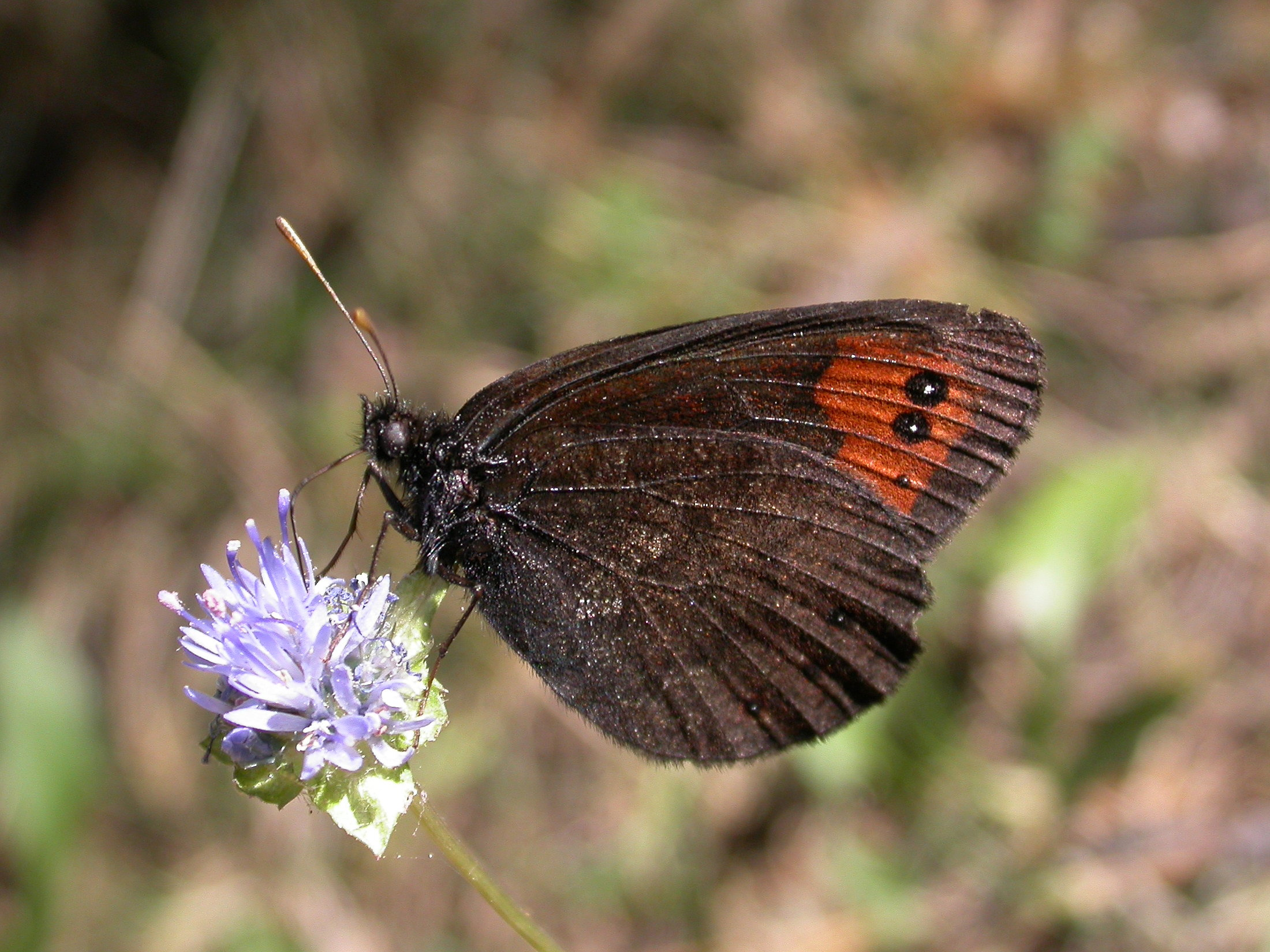 Erebia meolans (Nymphalidae, Satyrinae). Guadarrama, Segovia, España.